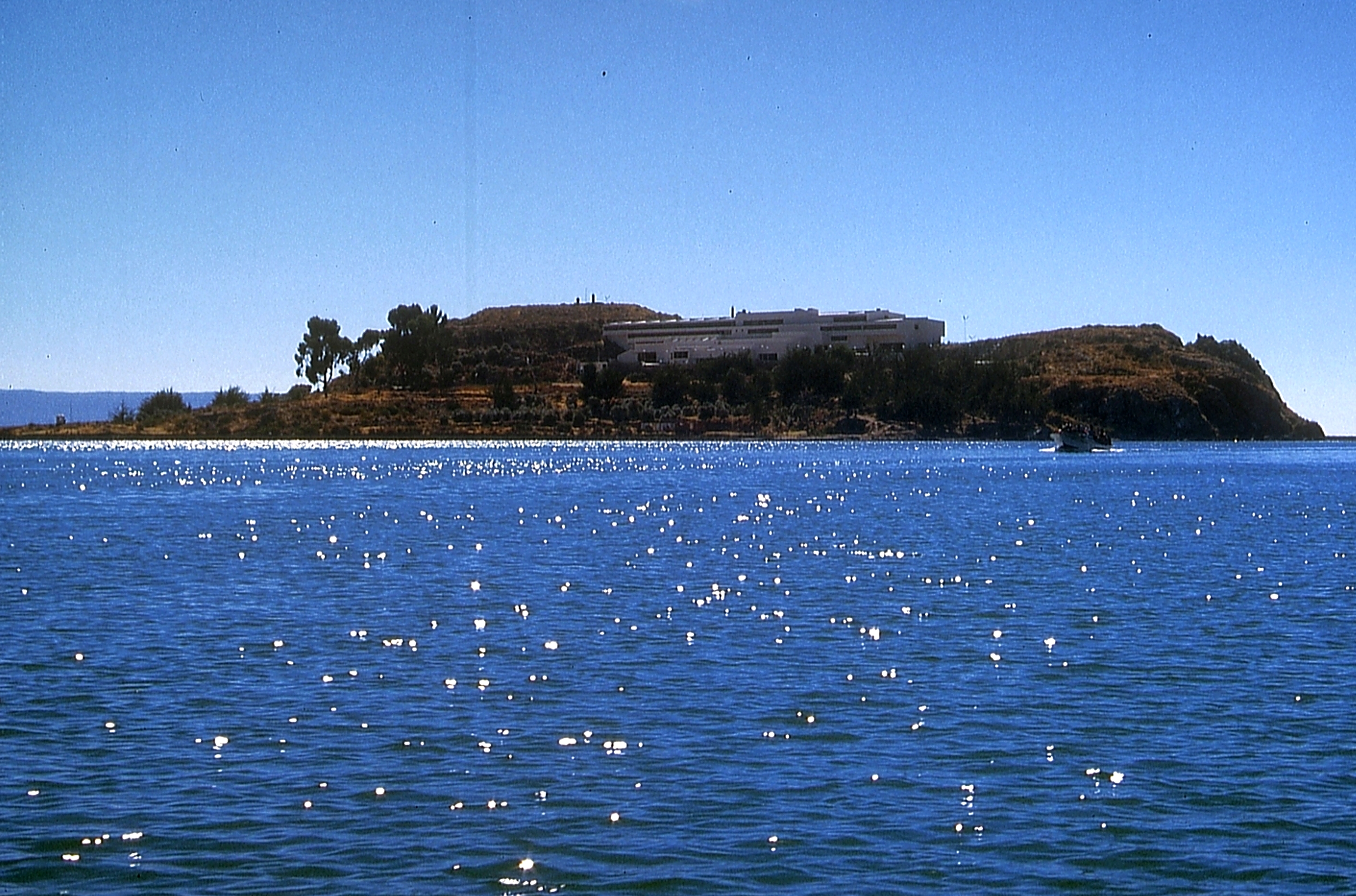 Hotel Libertador in Puno, Titicacasee